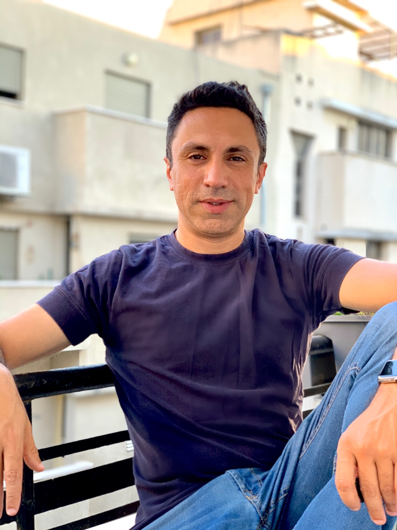 חיים פיליבה